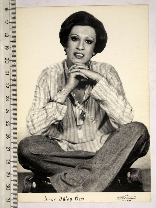 Tülay Özer hanımefendi tarafından tarafıma imza ile hediye resmi, Mart 1988. (Yükleyen: Zihni Akıncı)